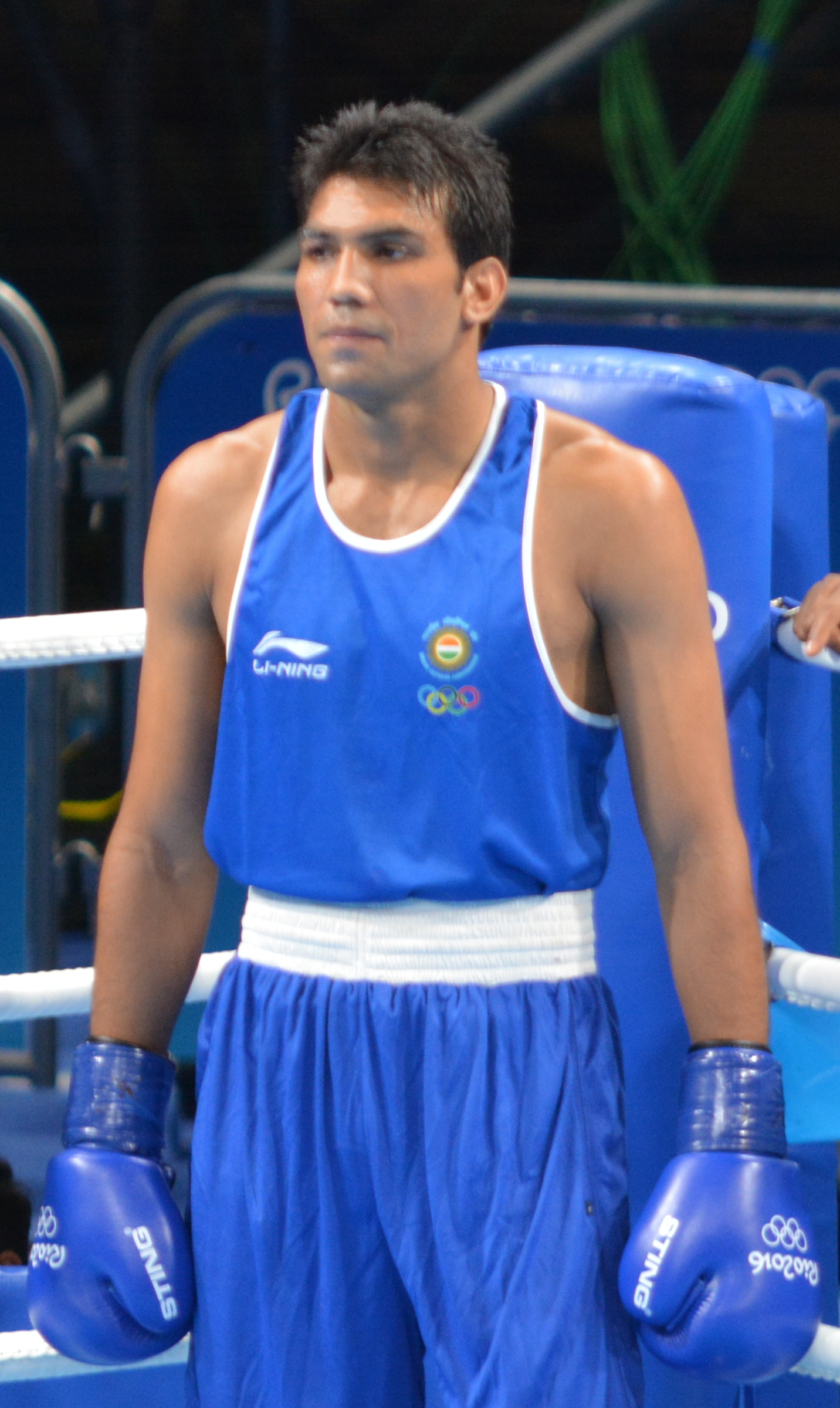 Boxe 64kg India vs Uzbequistão